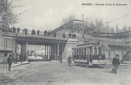 Modena - Porta San Francesco - tram